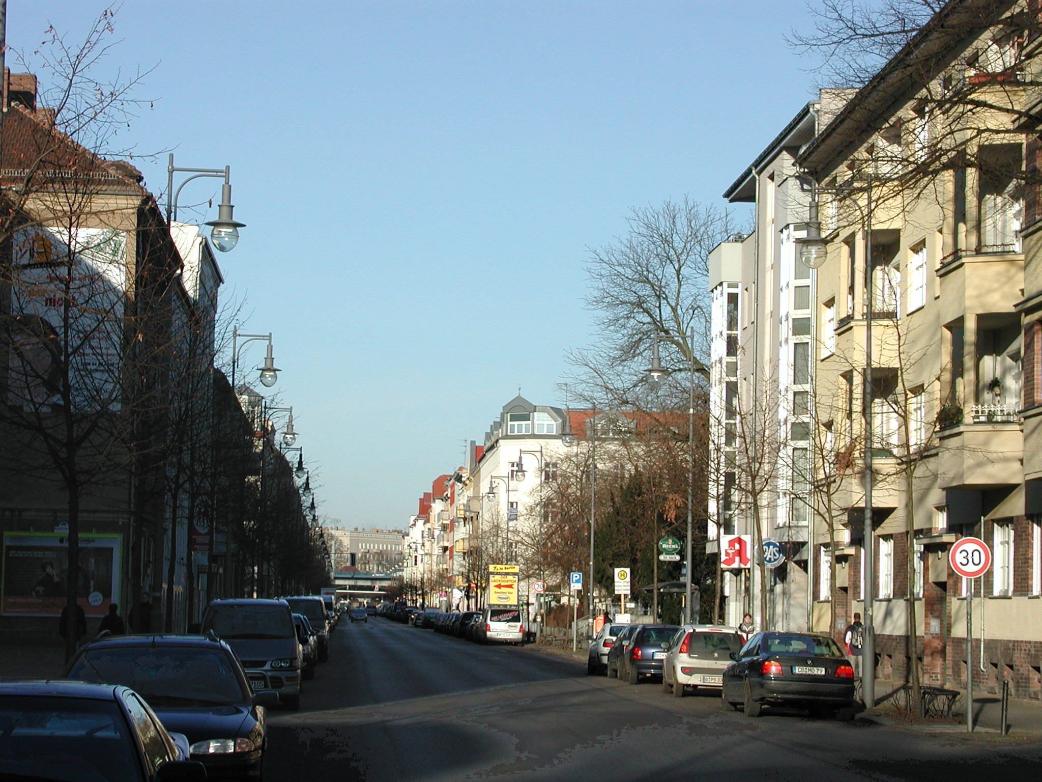 Blick entlang der Weitlingstraße